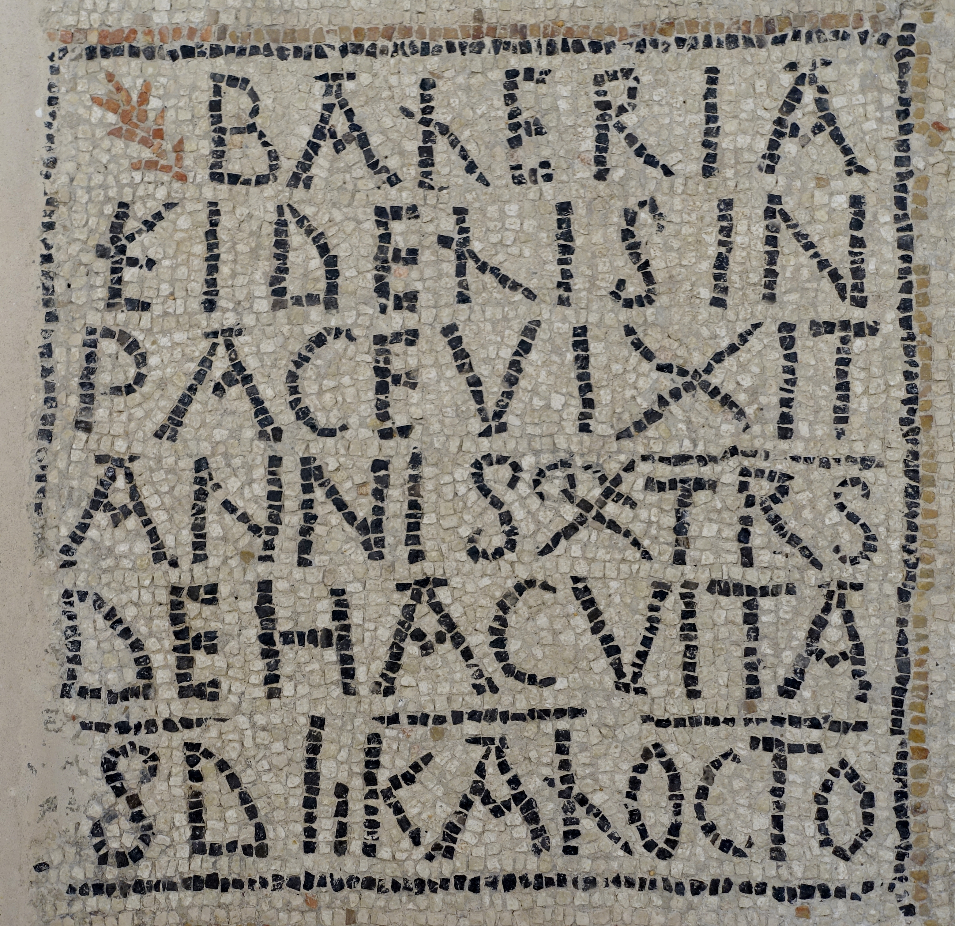 Grabschrift der Baleria aus der Mitte des 6. Jahrhunderts im Spätantiken Saal des Historischen Museums von Manacor (Museu d’Història de Manacor), Fundort Son Peretó, Gemeinde Manacor, Mallorca, Spanien